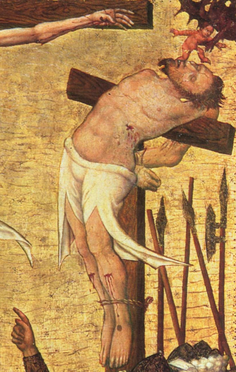 detail